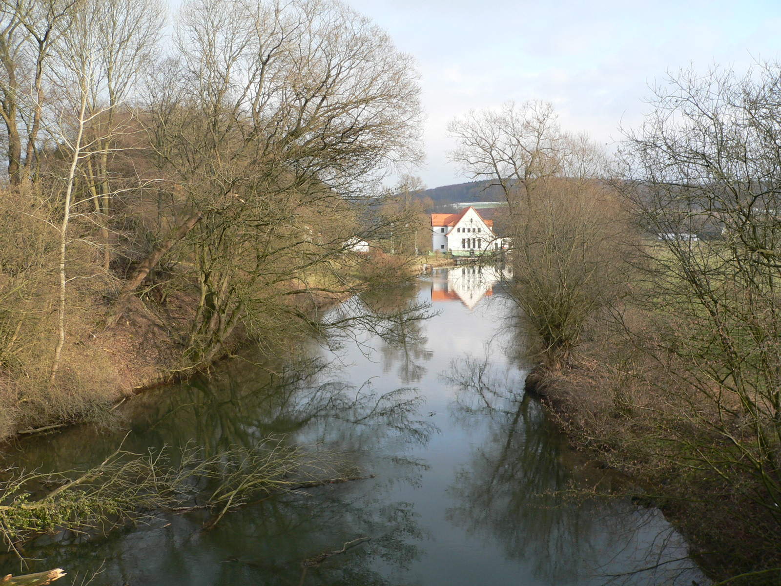 Diemelkraftwerk beim Hofgut Wülmersen Quelle: selbst fotografiert Fotograf/Zeichner: presse03 Datum: Februar 2006